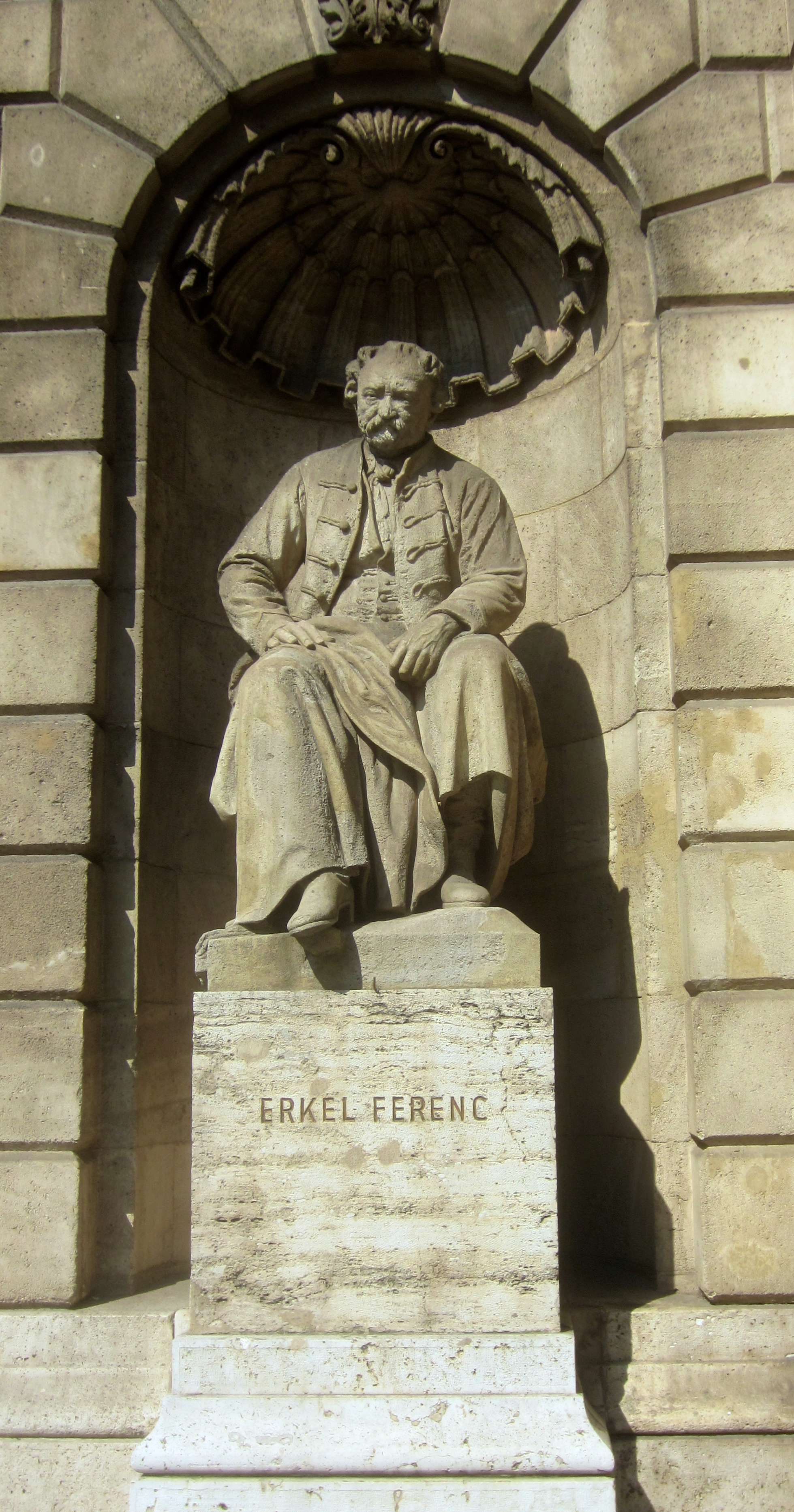 Ferenc (Franz) Erkel, född 7 november 1810 i Gyula, Ungern, död 15 juni 1893 i Budapest, var en ungersk tonsättare. Han komponerade bland annat operor och den ungerska nationalsången (1844). Erkel skapade den ungerska operan och ivrade för den nationella och musikkulturella rörelsen i sitt hemland.